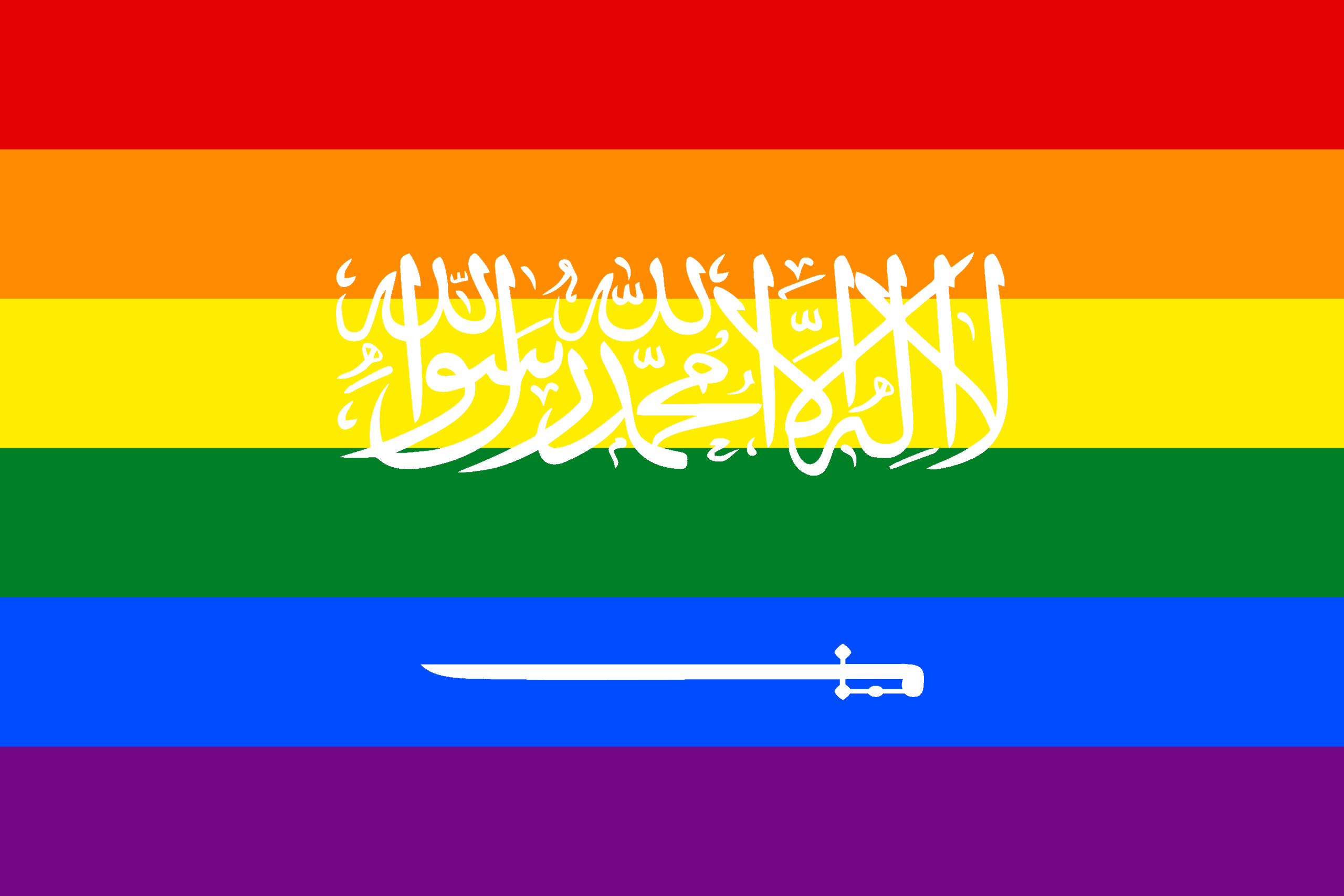 Bandera gay Arabia Sauidí